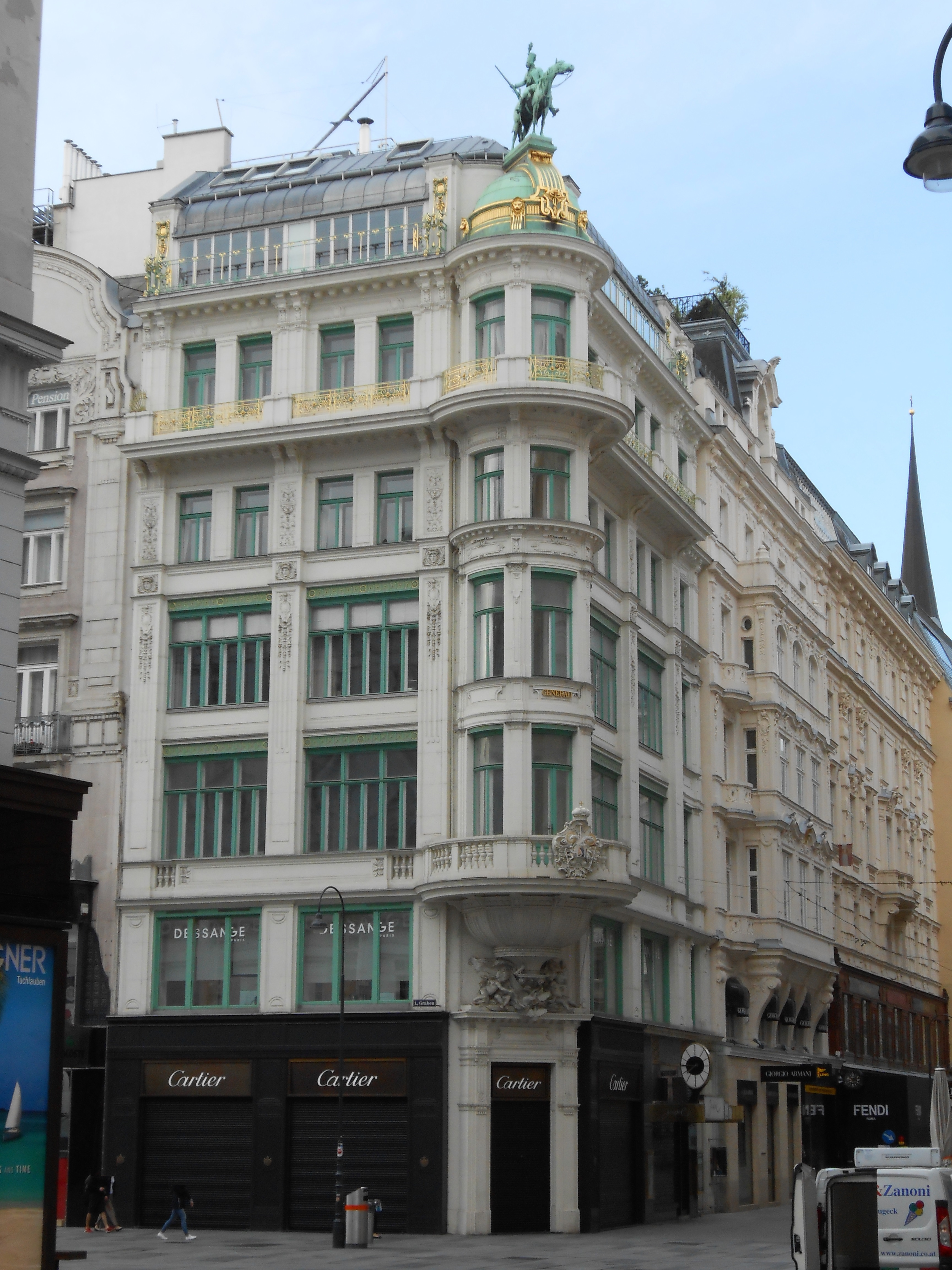 Husarenhaus am Graben 18 oder Kohlmarkt 1 in Wien